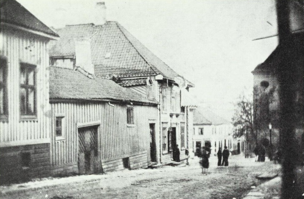 En liten snipp av Pausegården (helt til venstre; eid av Christopher Blom Paus), Apoteket (midten) og Schaannings gård (i bakgrunnen), Skien, før bybrannen i 1886